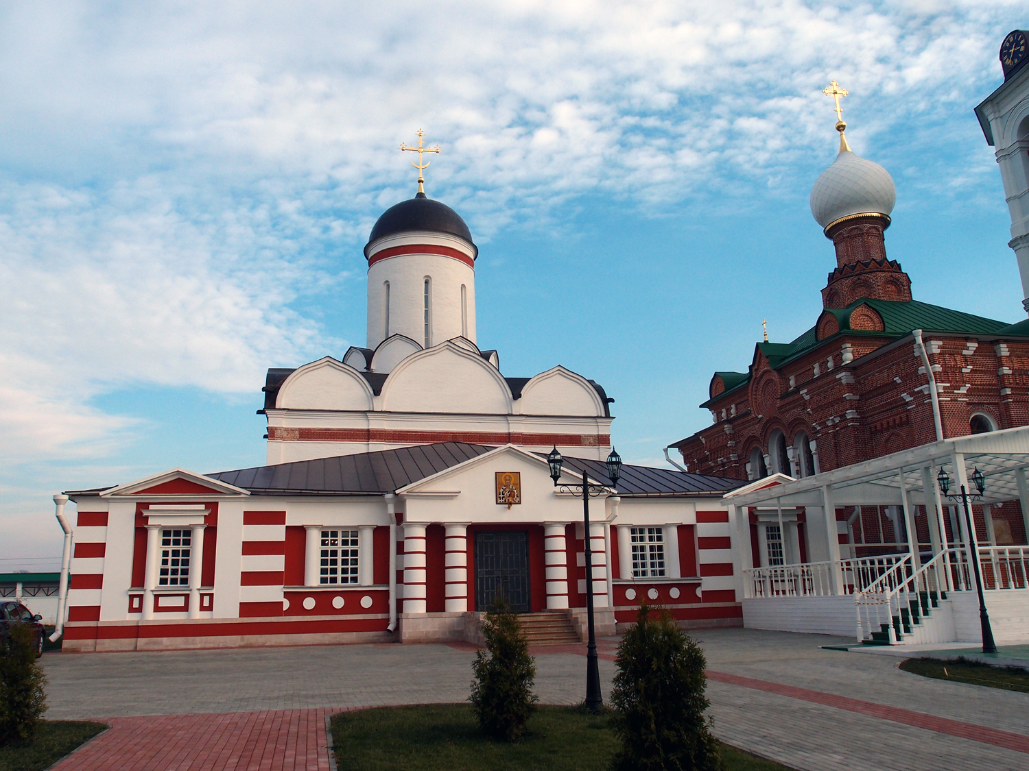 Николо-Пешношский монастырь (Москва и Московская область, Солнечногорск, село Рогачево (посёлок Луговой))